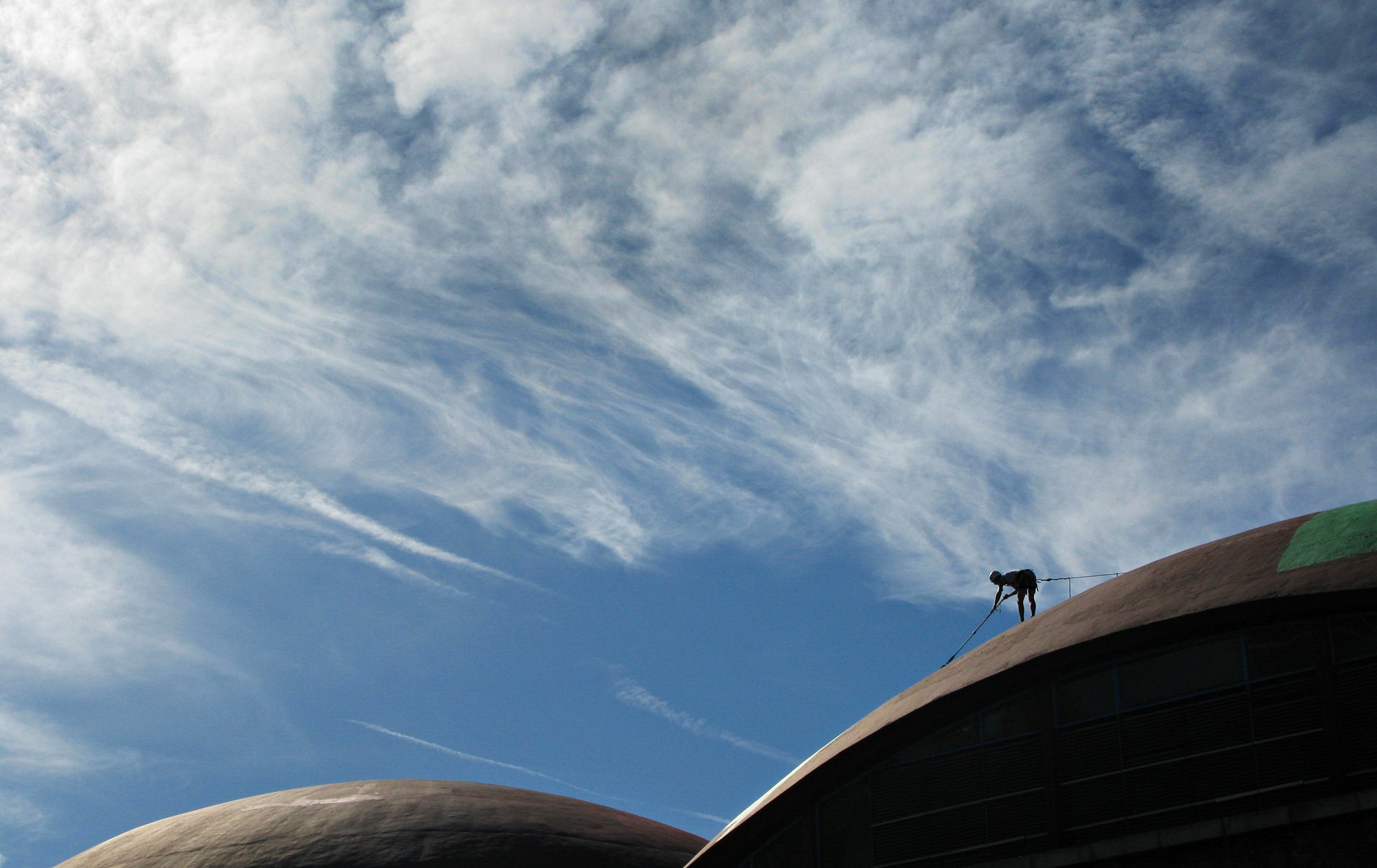 BoaMistura